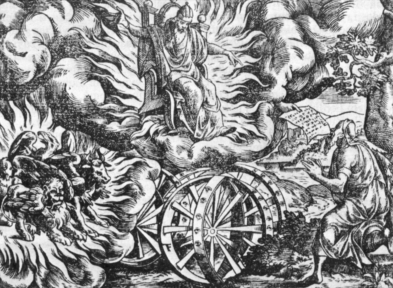 Prorok Eliáš je odnášen na ohnivém voze, dřevořez z Bible Melantrichovy